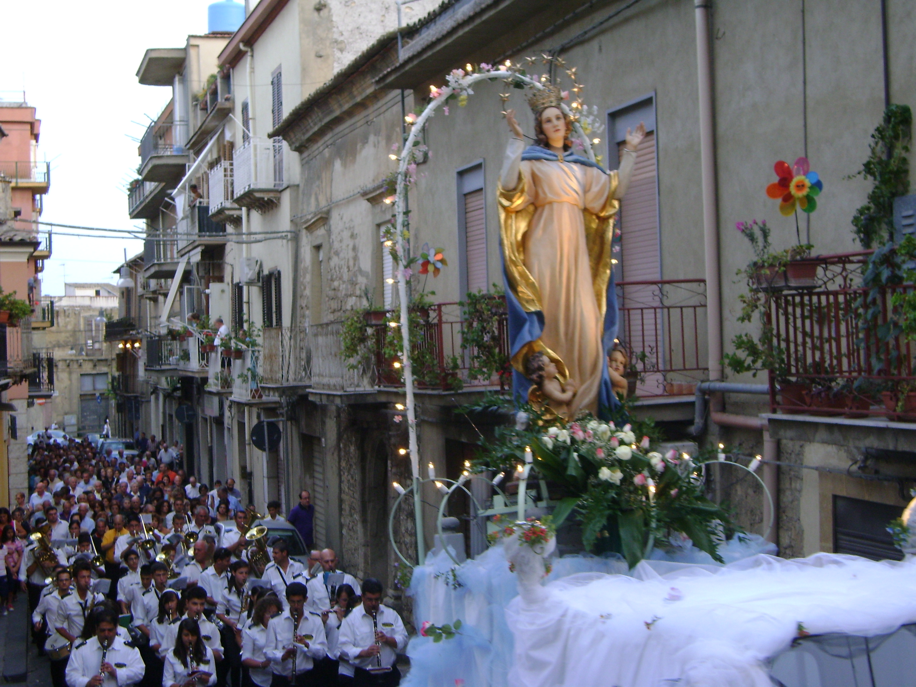 Processione della Madonna Assunta, il 15 agosto nella città di San Cataldo, provincial Caltanissetta.